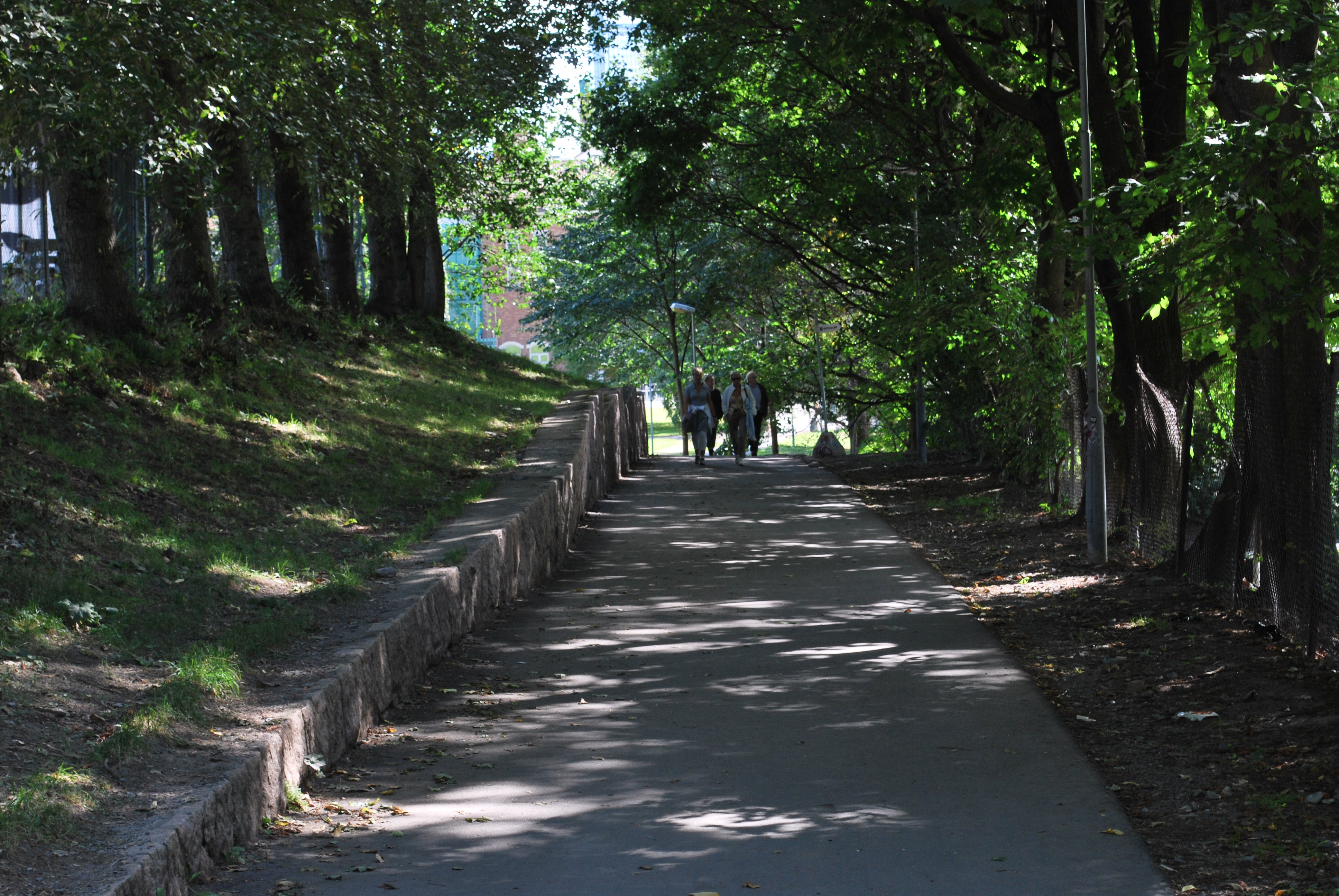 Rigmor Luihns vei, gangvei fra Grünerbrua og Nordre gate i sør, langs den vestlige kanten Grünerhagen og til Marselis' gate i nord, Grünerløkka, Oslo. Her øvre del sett mot syd.